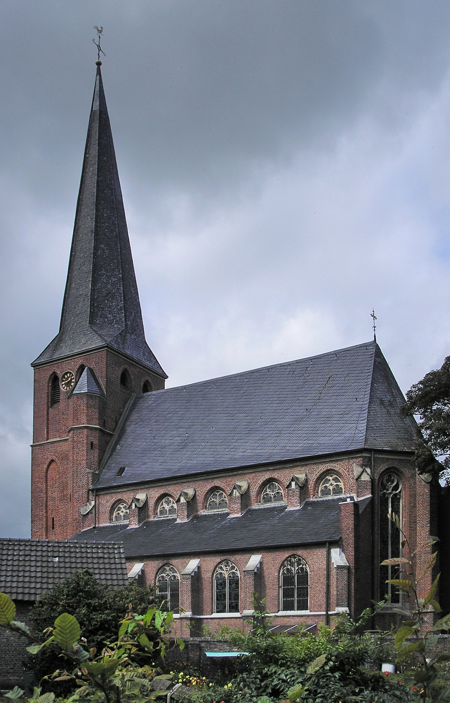 Kirche St. Martin im Klever Ortsteil Griethausen